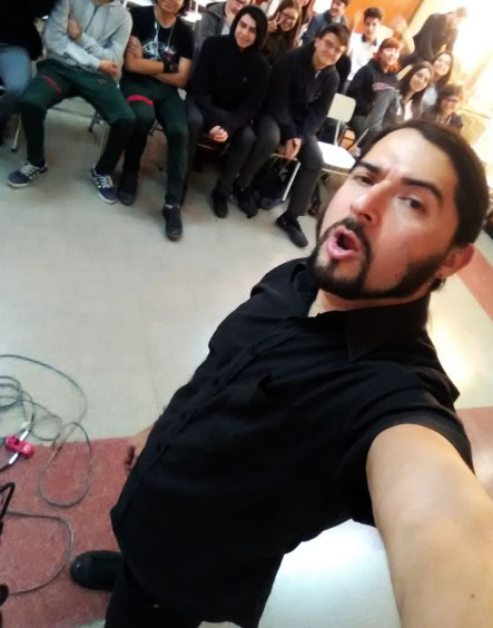 victor dando charla motivacional a niños en Santiago de Chile Septiembre 2018